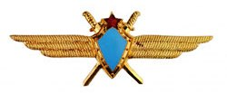 Нагрудный знак "Военный лётчик без класса"